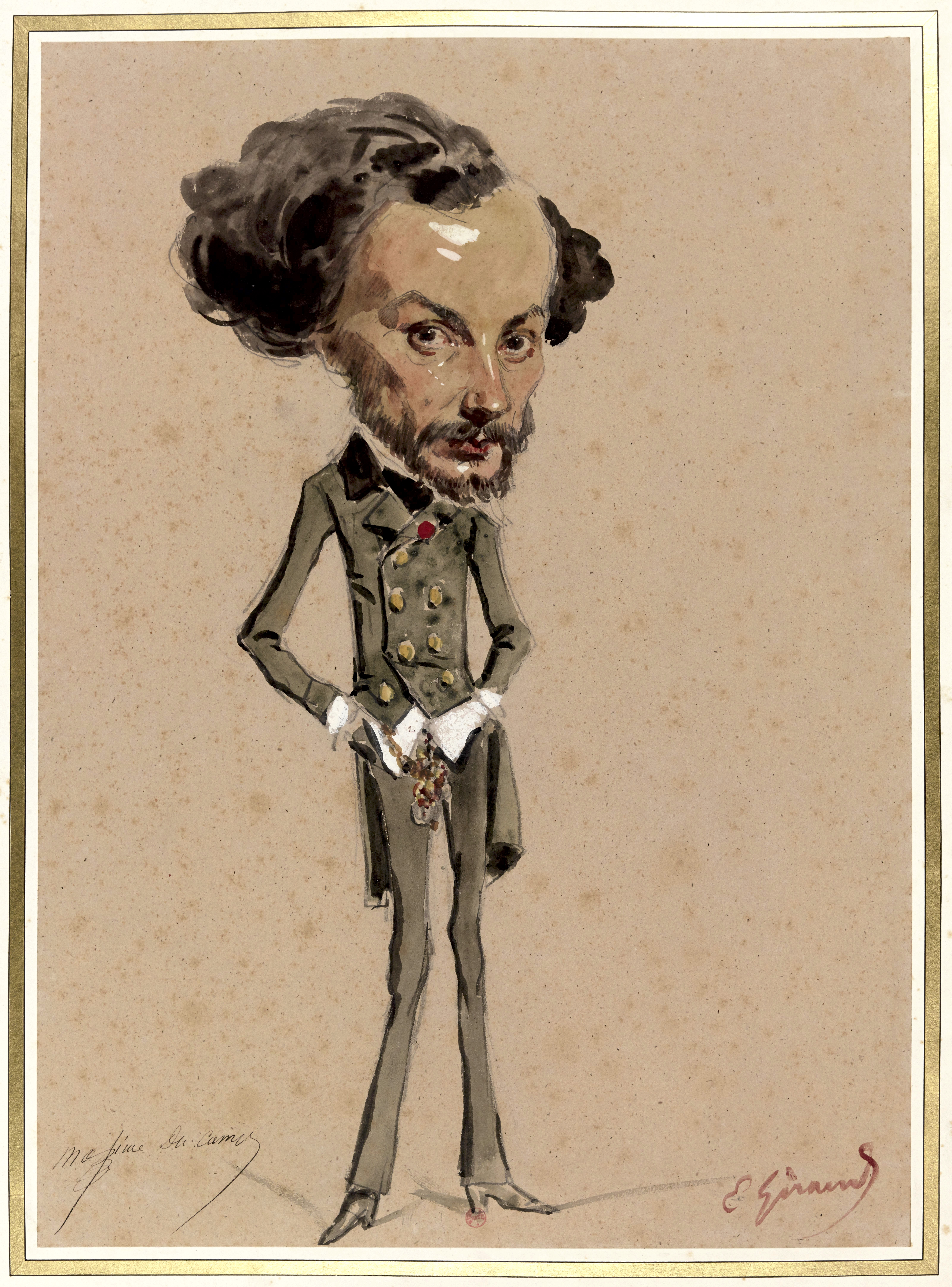 Maxime Du Camp (1822–1894)), French writer and photographer.